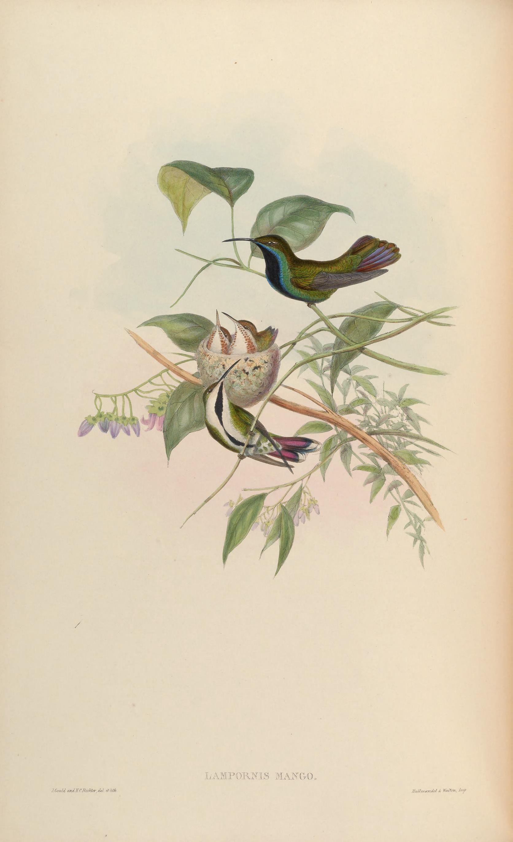 / iLAMPCDRMS MAJ^&O I.Q'aU o(nd,l..Cmrmft\li'. HjI^i ..uU7tftx.f/J.d ii '^foil^^m., h'f